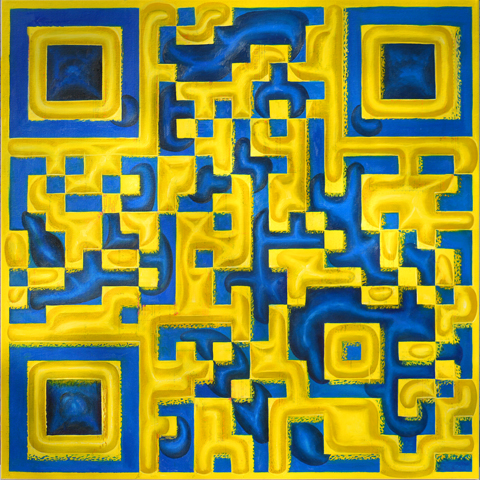 Acryl-Malerei „Heimat“ von Michael Weisser. Funktionierender QR-Code mit Linkziel